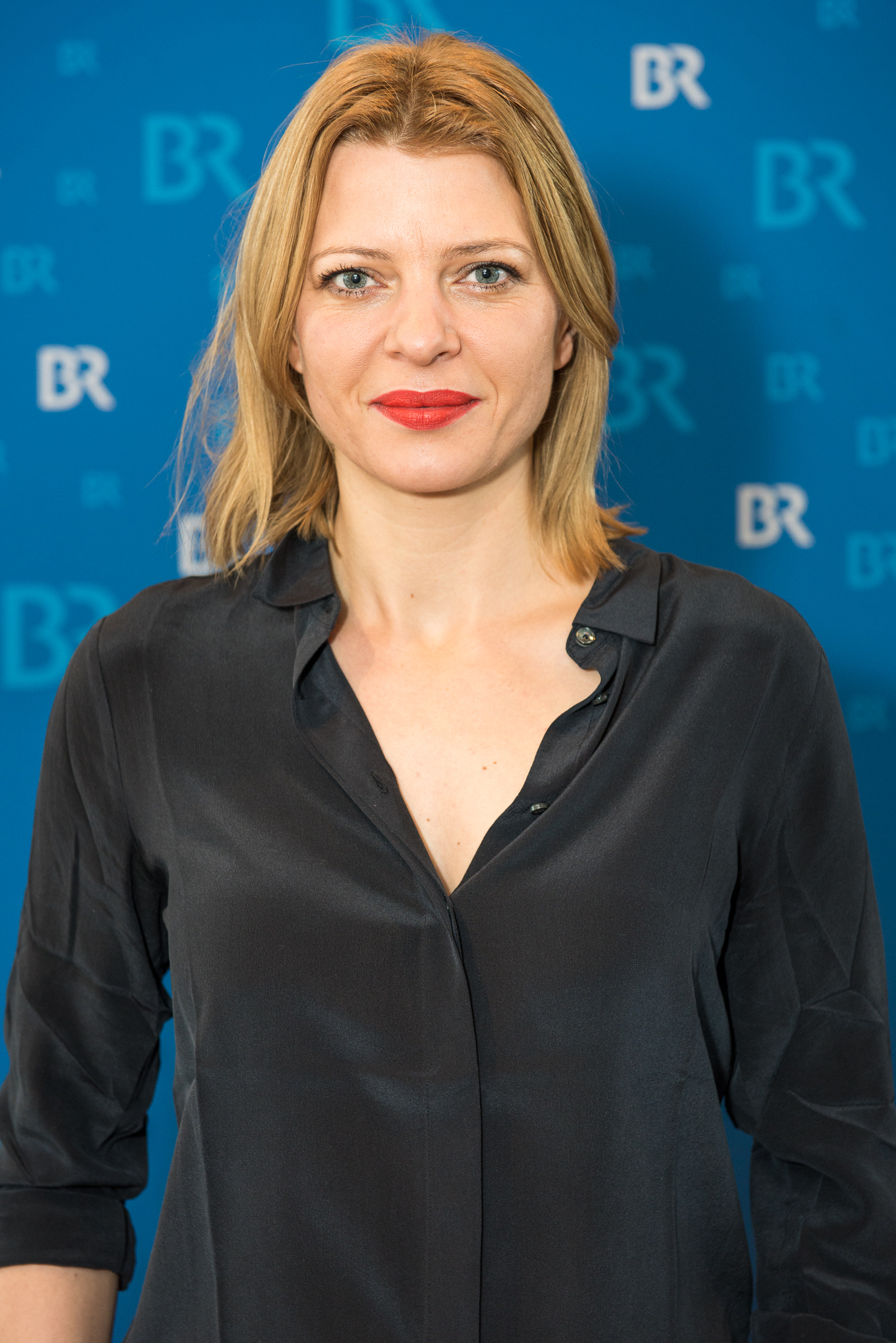 BR,Bayerischer Rundfunk,Bayerisches Fernsehen,Filmbrunch 2015,Jördis Triebel